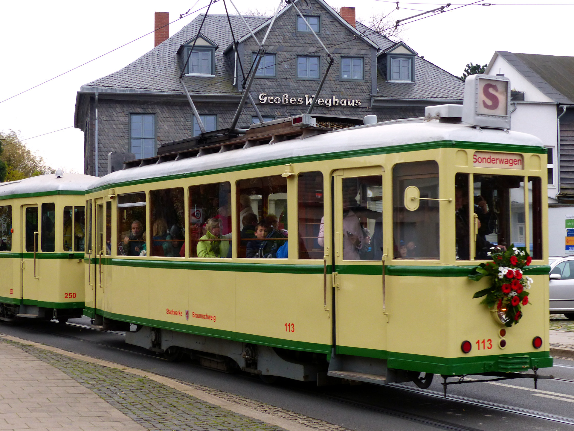 Tram 113 während der Tramparade am Großen Weghaus, Fahrt Richtung Stöckheimer Markt.